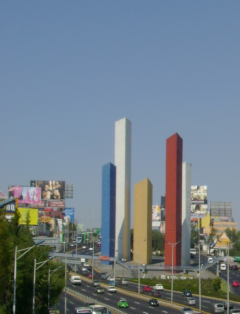 Las Torres de Satélite en la ciudad del mismo nombre, Naucalpan, Estado de México.